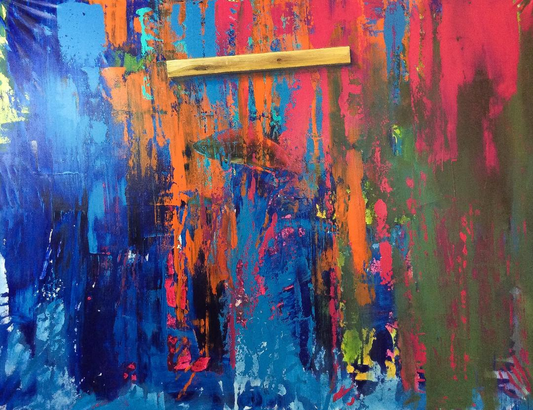 Lazacvonulás, 150x190 cm, akril, vászon, 2018